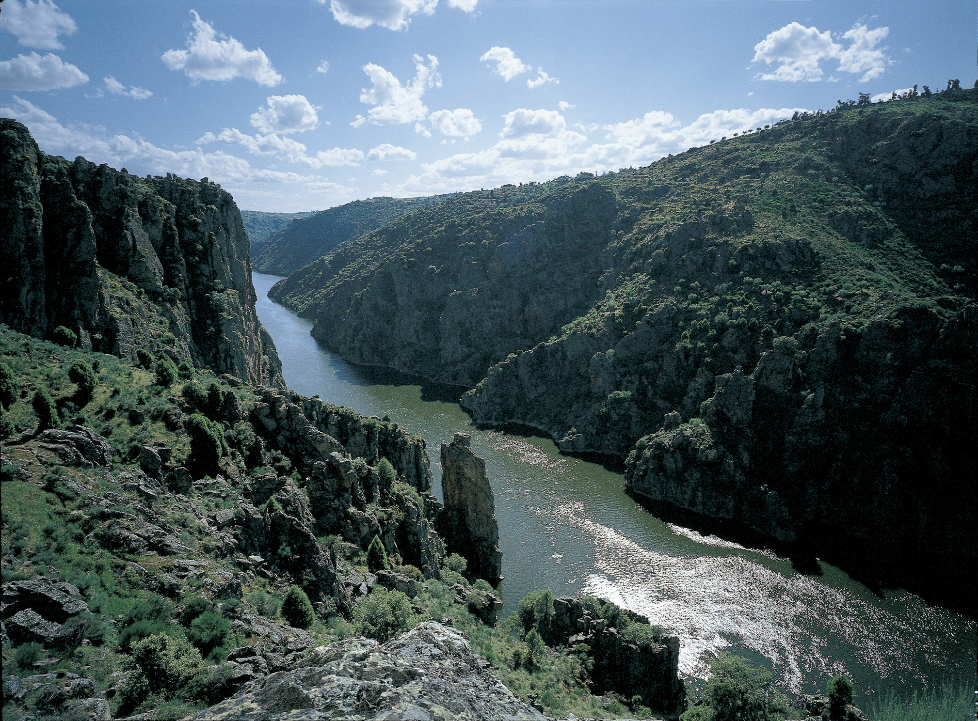 Arribes del Río Duero, Zamora